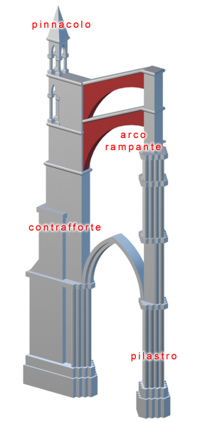 Rappresentazione 3D di un contrafforte con evidenziato il sistema di archi rampanti. Immagine realizzata da Hill